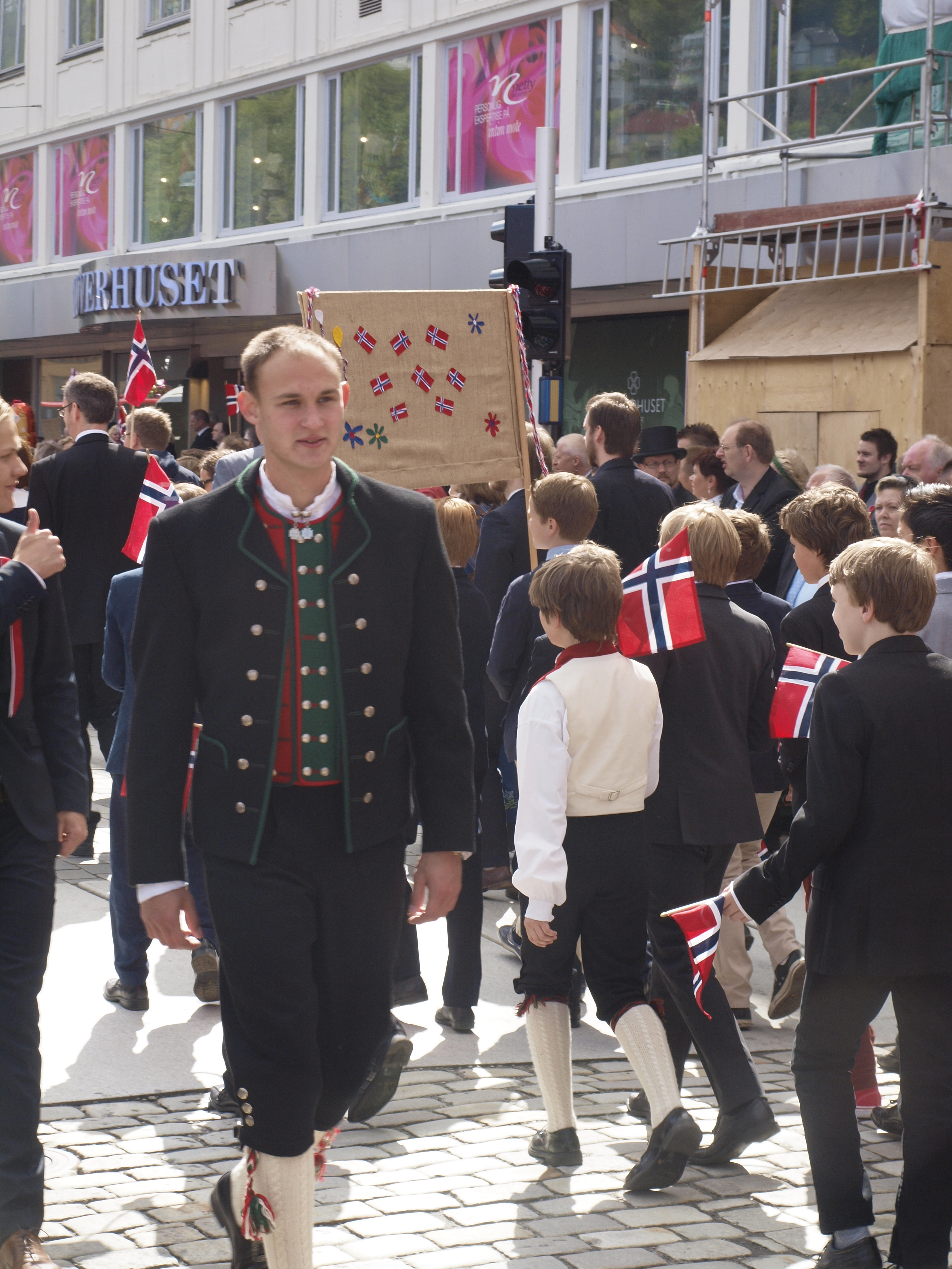 Øystein Øvretveit in 2014